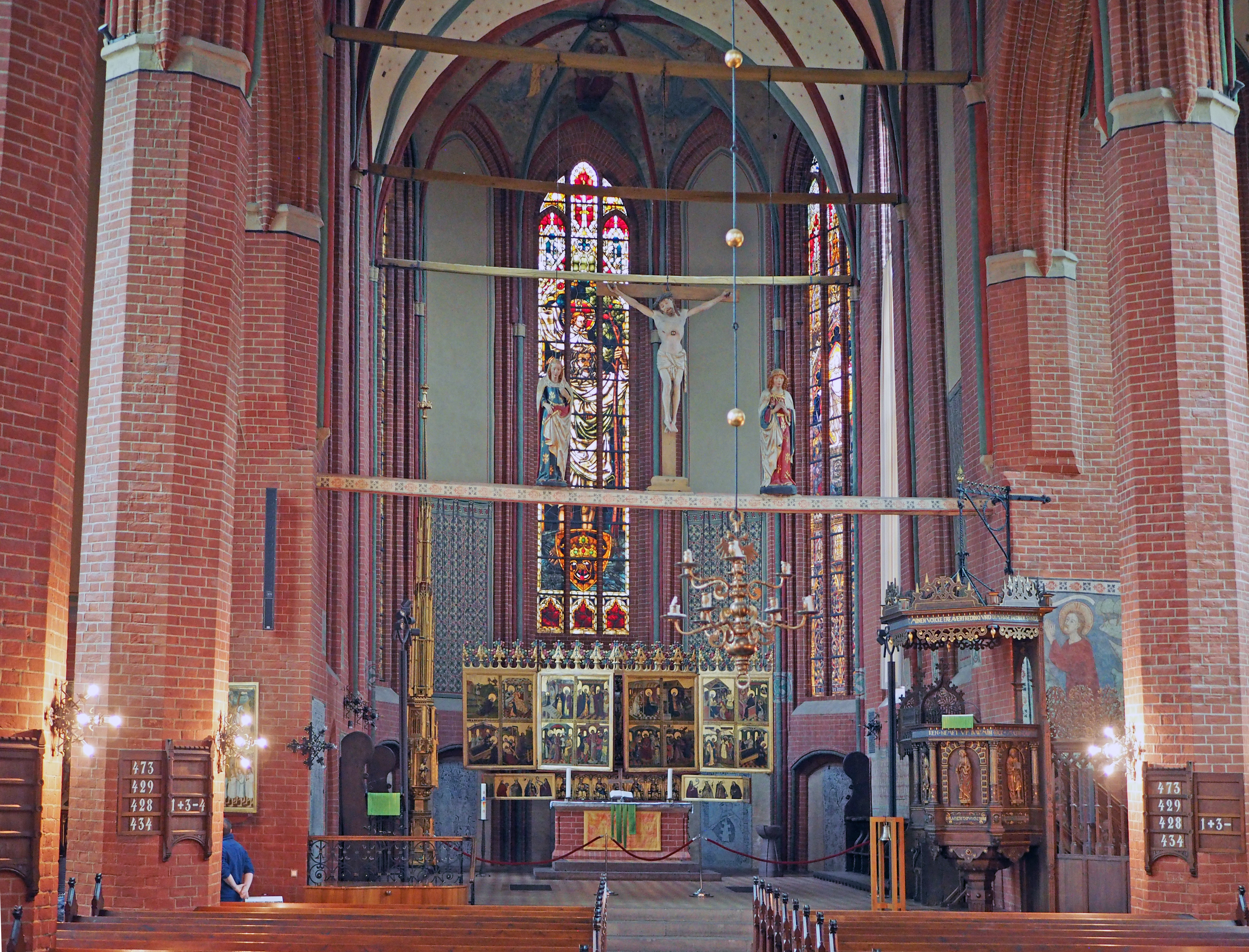 Langhaus der Klosterkirche des Klosters zum Heiligen Kreuz (Rostock), mit Altar und Kanzel